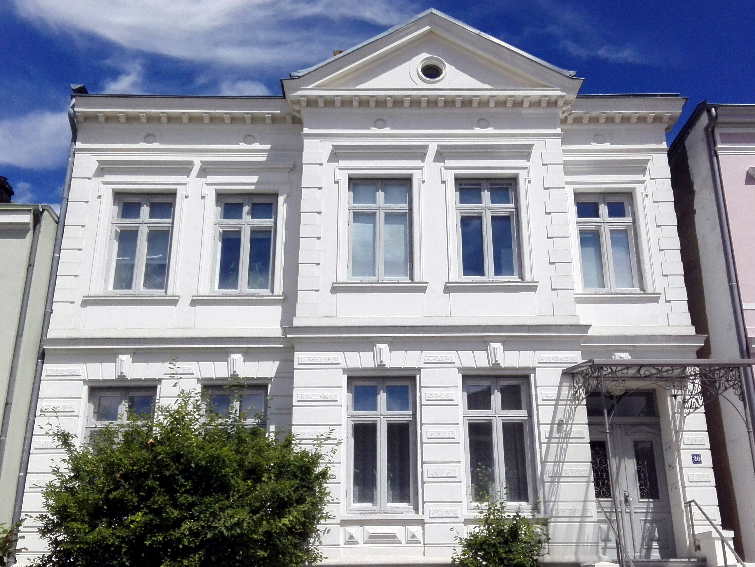 Einstiger Alterswohnsitz der Familie Ohnesorge in der Sophienstraße 26.